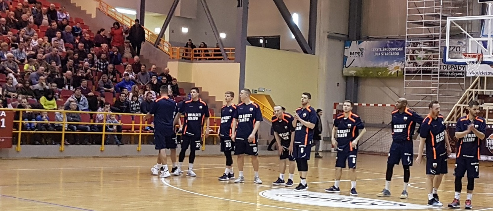 R8 Basket AZS Politechnika Kraków